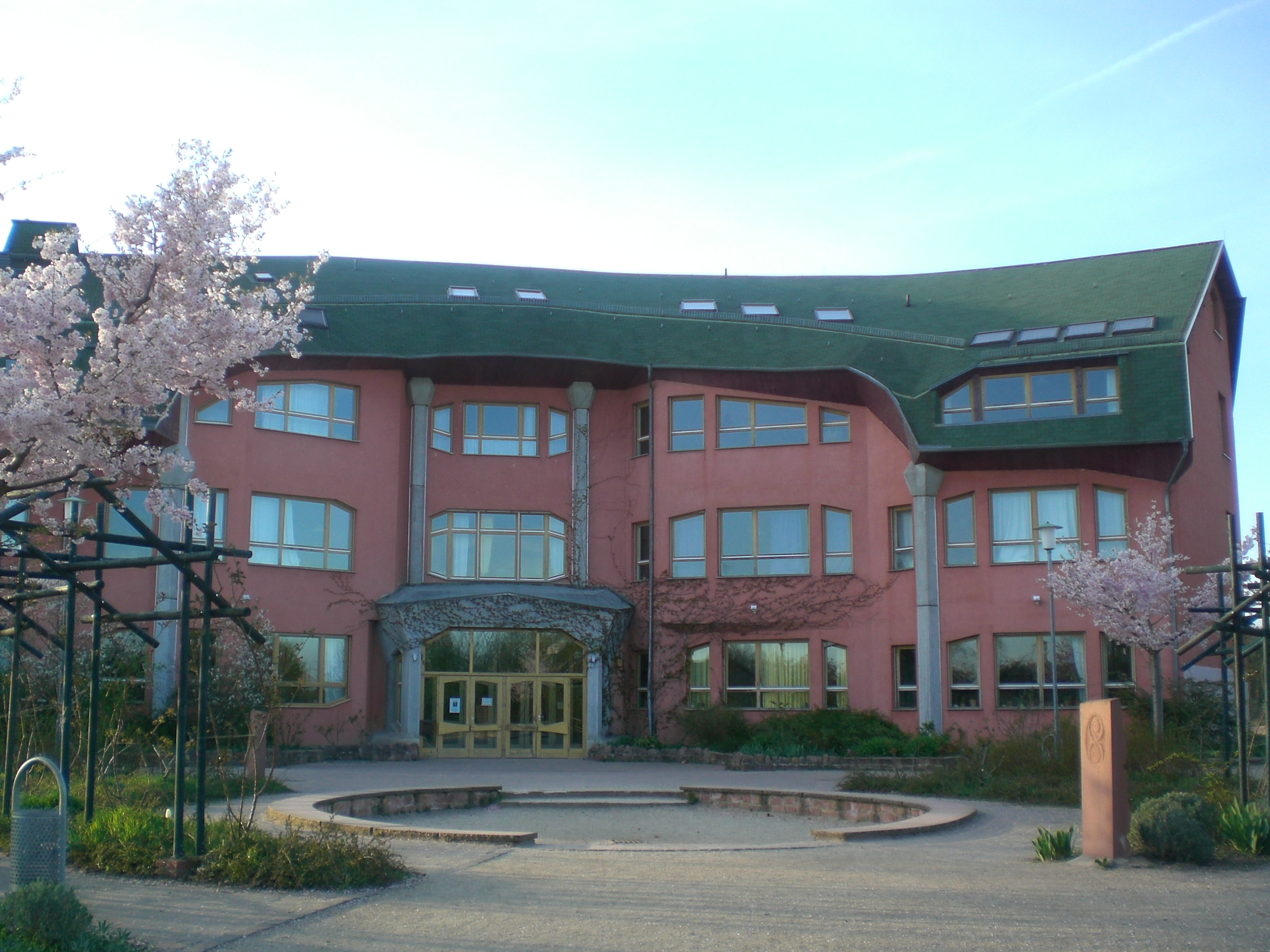 fasado de la valdorfa lernejo en Dietzenbach (Germanio) Fonto: propra foto